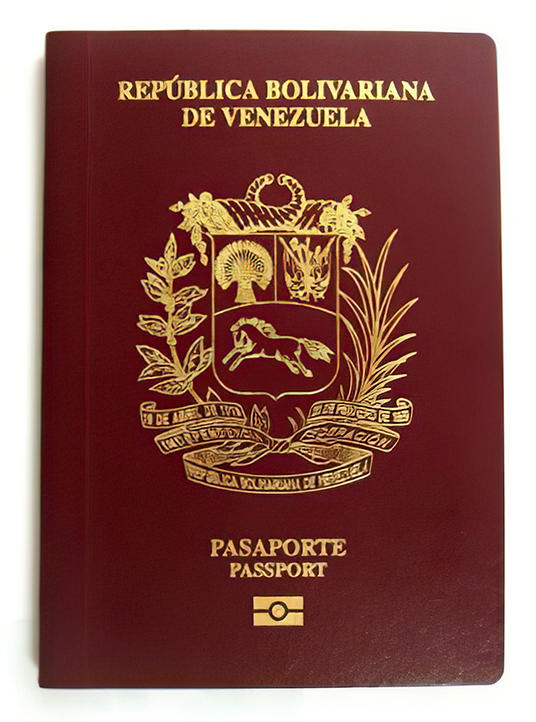 Pasaporte biometrico venezolano